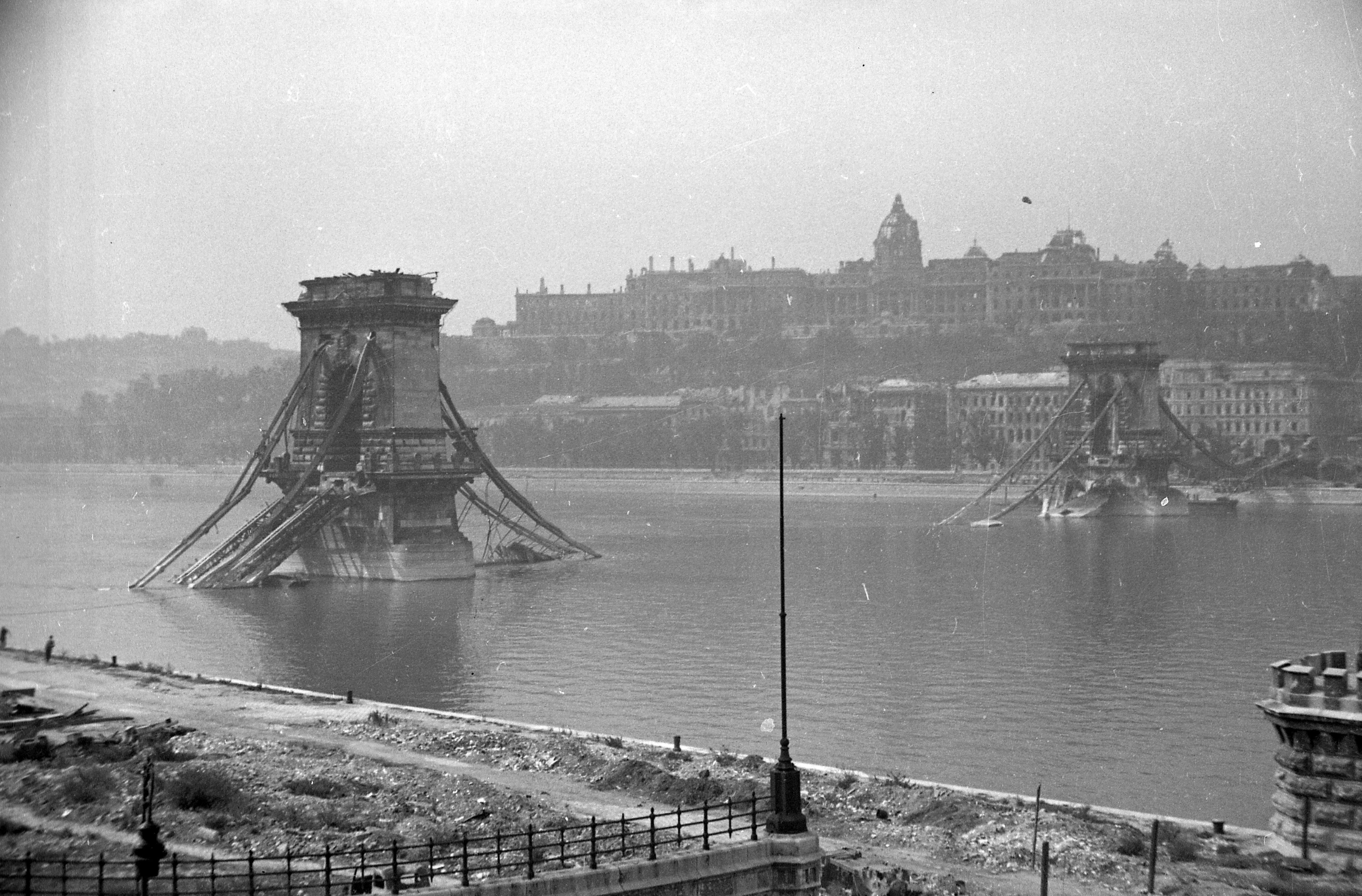 a lerombolt Lánchíd és a romos Királyi Palota. Location: Hungary, Budapest Title: a lerombolt Lánchíd és a romos Királyi Palota.